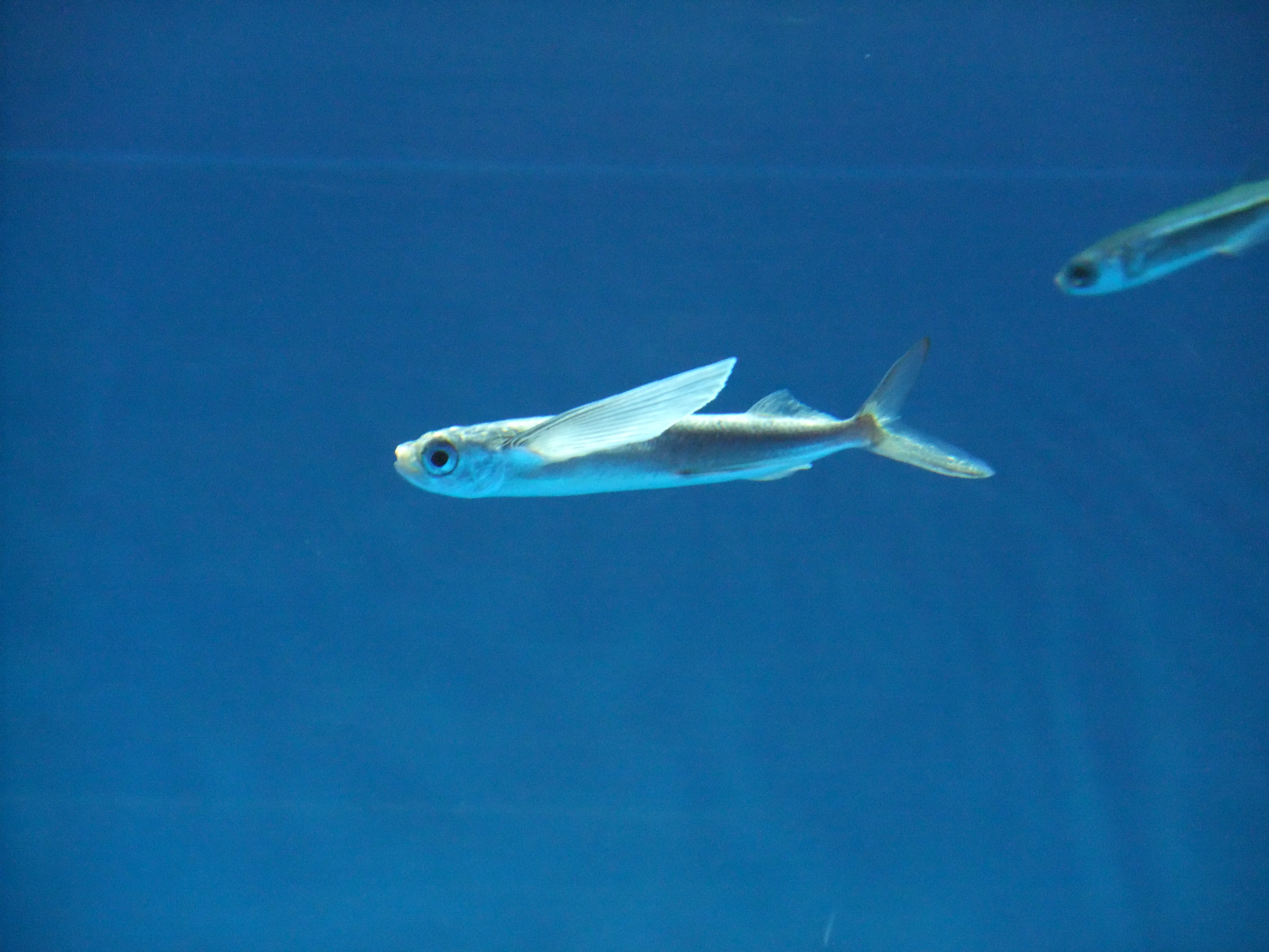 アクアス展示 野焼きの材料ことトビウオ